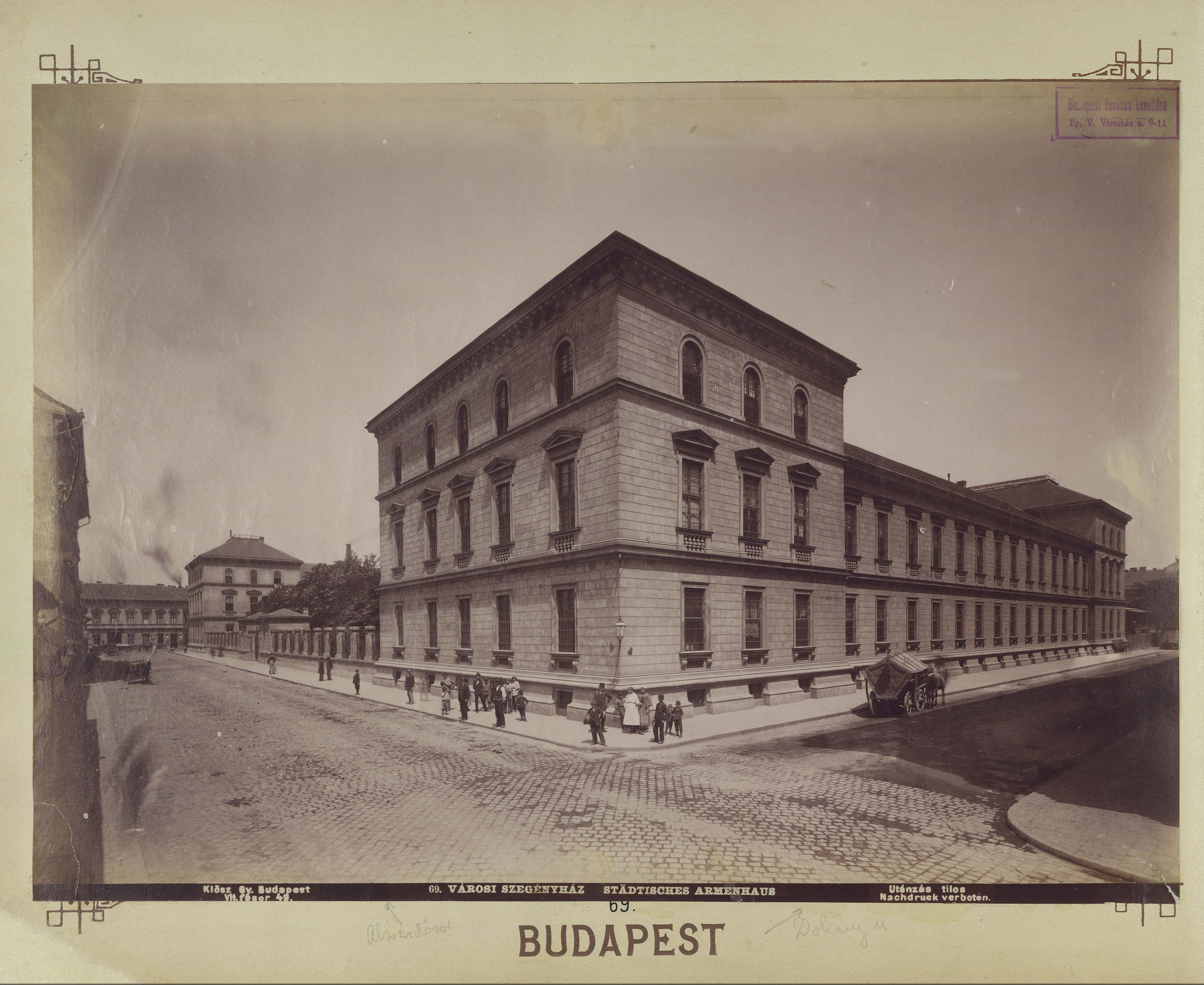 Alsó erdősor utca - Péterfy Sándor (Óvoda) utca sarok. Erzsébet szegényápoló ház (ma Erzsébet Kórház). A felvétel 1890 után készült. A kép forrását kérjük így adja meg: Fortepan / Budapest Főváros Levéltára. Levéltári jelzet: HU.BFL.XV.19.d.1.07.070 Location: Hungary, Budapest VII. Tags: Budapest